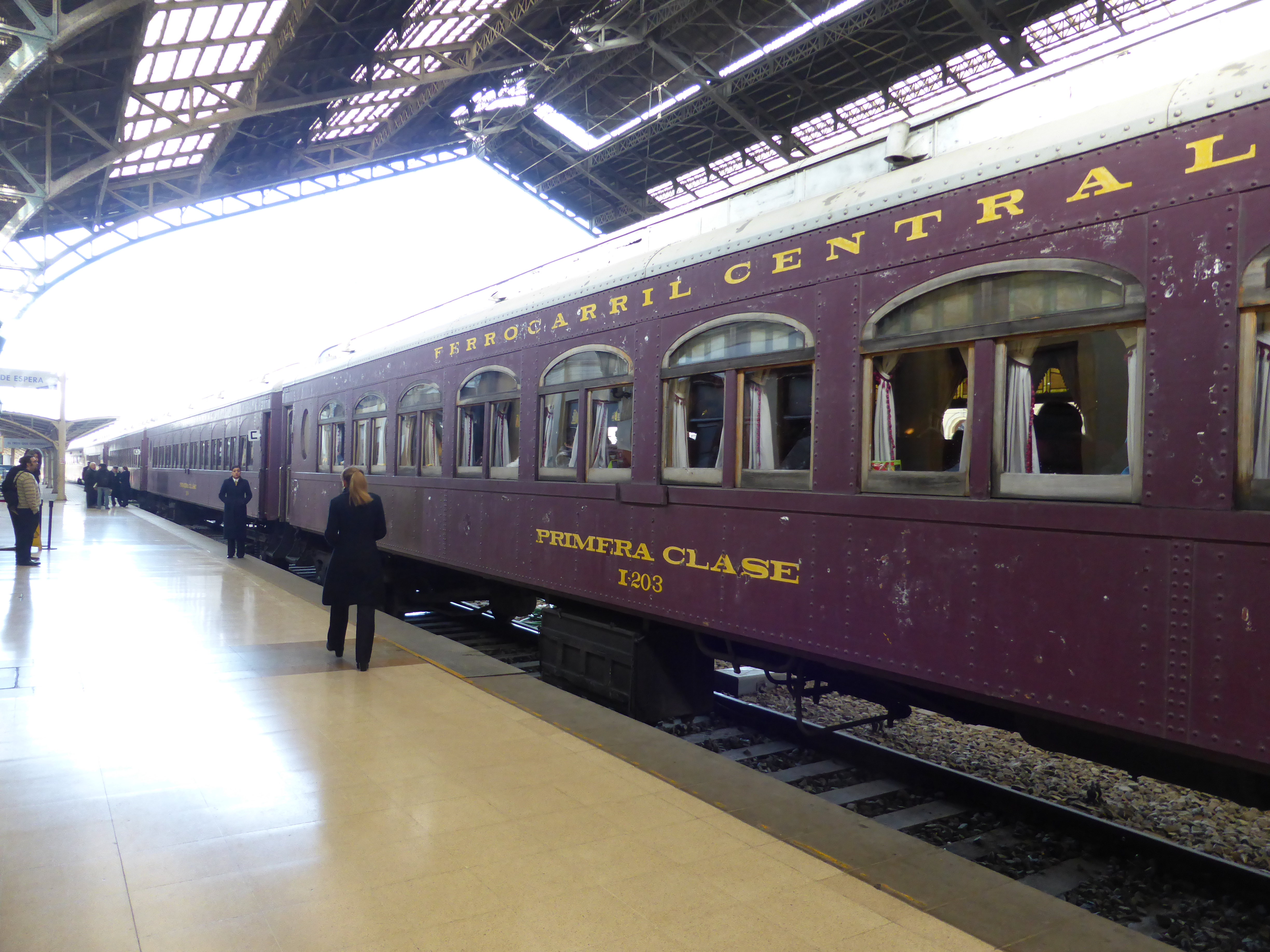 El "Tren del Recuerdo" es un tren turístico chileno, que circula un par de veces al mes entre la Estación Central de Santiago y el puerto de San Antonio. Varios coches de pasajeros fueron construidos en Alemania por "Linke Hofmann", a partir del año 1923. Por ejemplo, el coche metálico "I-203", de primera clase, fotografiado en primer término, es del año 1923.